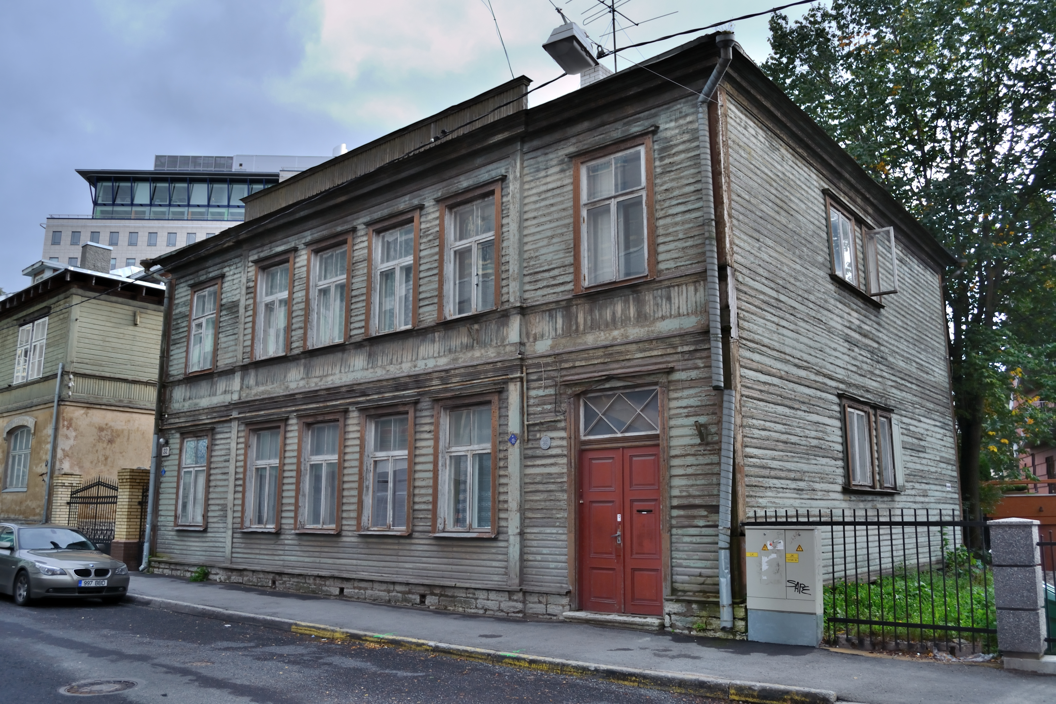 Tallinn, elamu Tatari 32